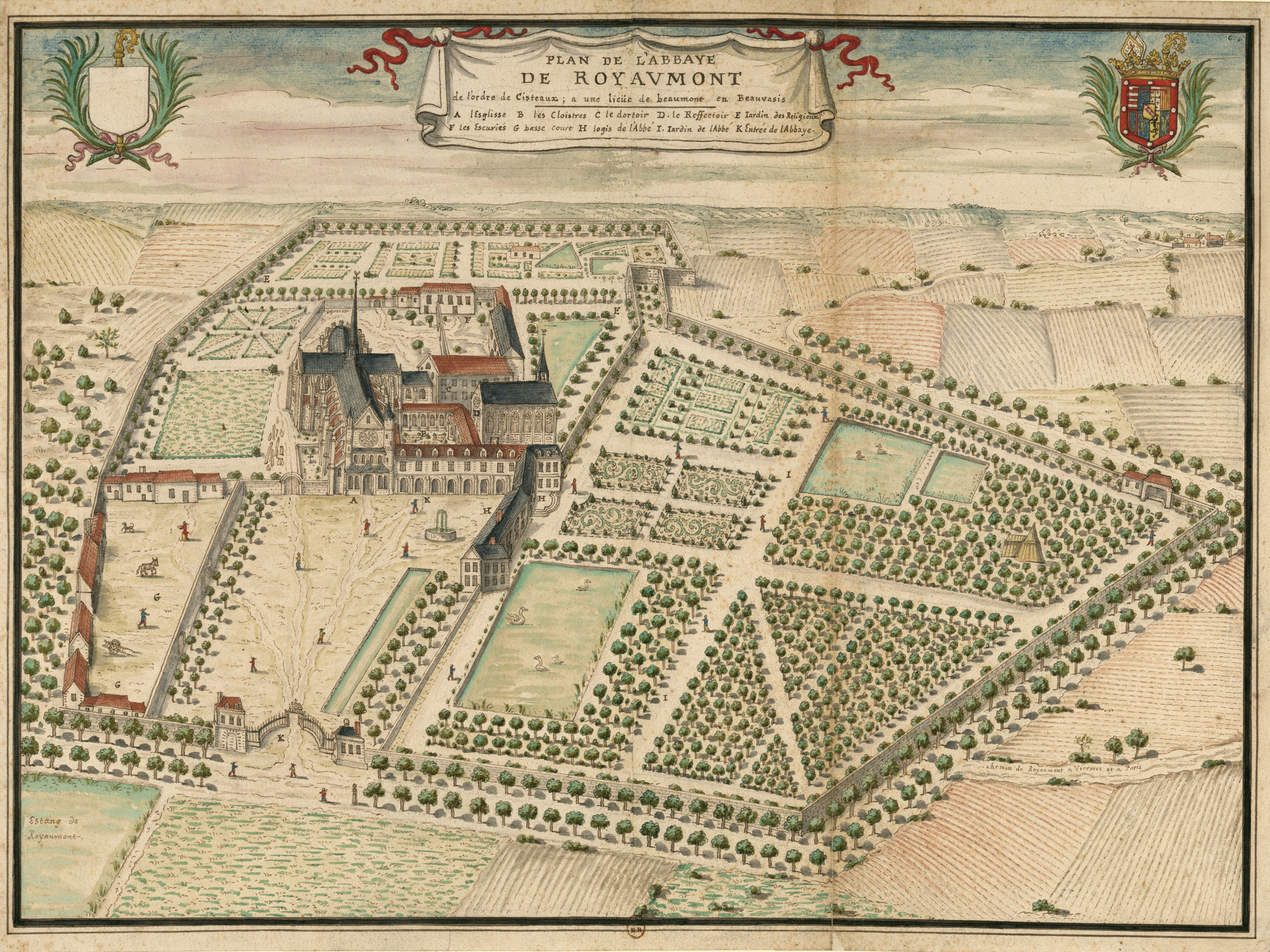 Plan de l'Abbaye de Royaumont, de l'ordre de Cisteaux; à une lieüe de beaumont en Beauvaisis : [dessin] / [Louis Boudan]